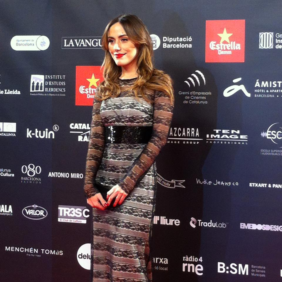 Irene Montalà - V Premis Gaudí 2013